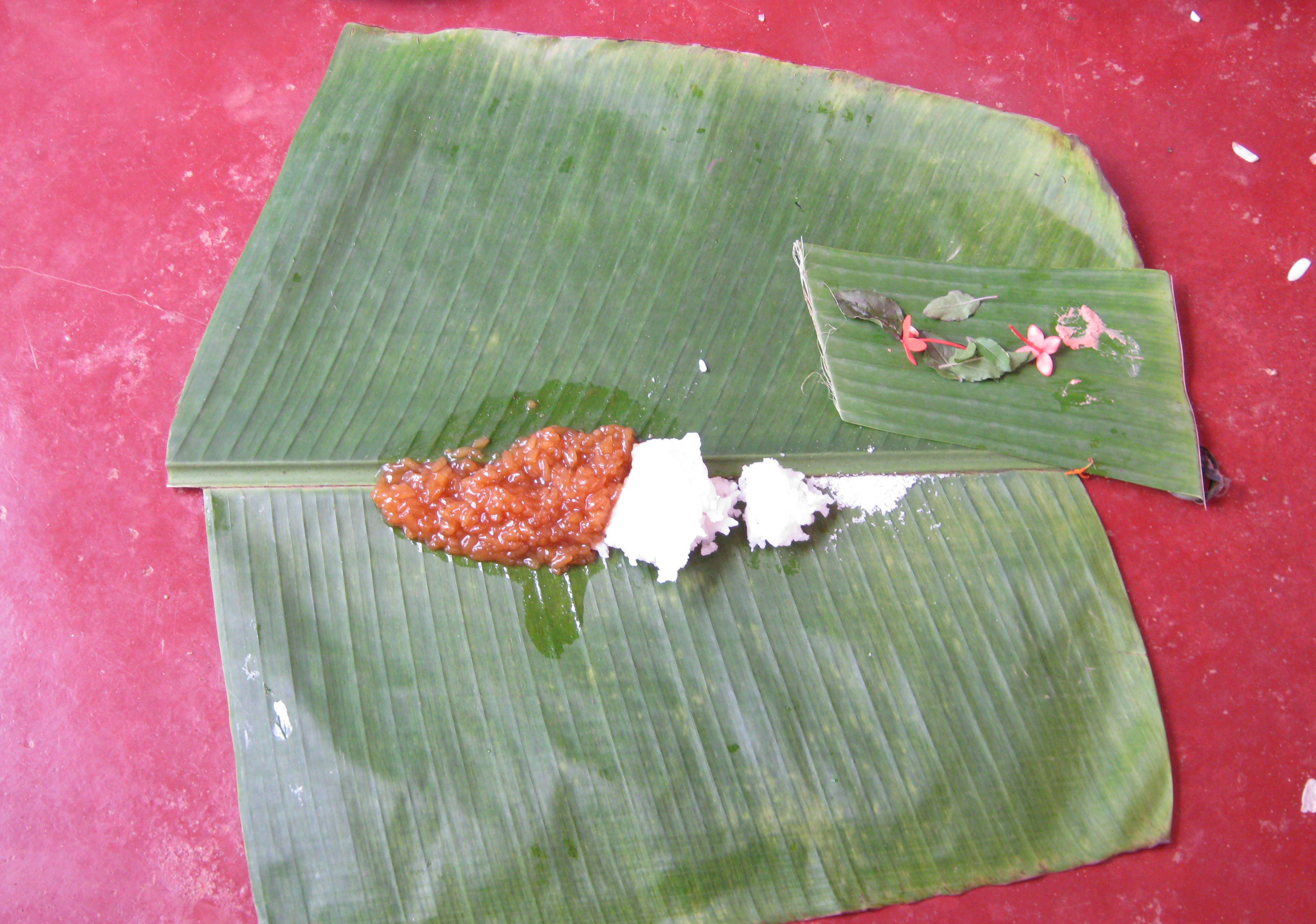 ചോറൂണ്; ചടങ്ങിനായി തൂശനിലയിൽ വിളമ്പിയ ചോറ്